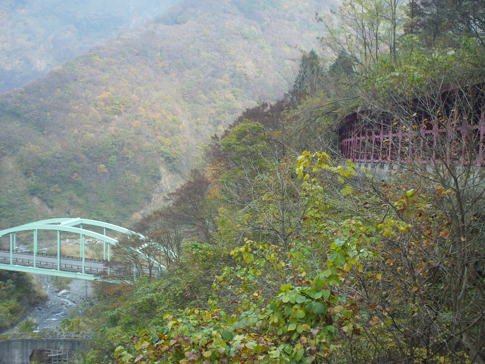 新潟県道375号平岩停車場蒲原線